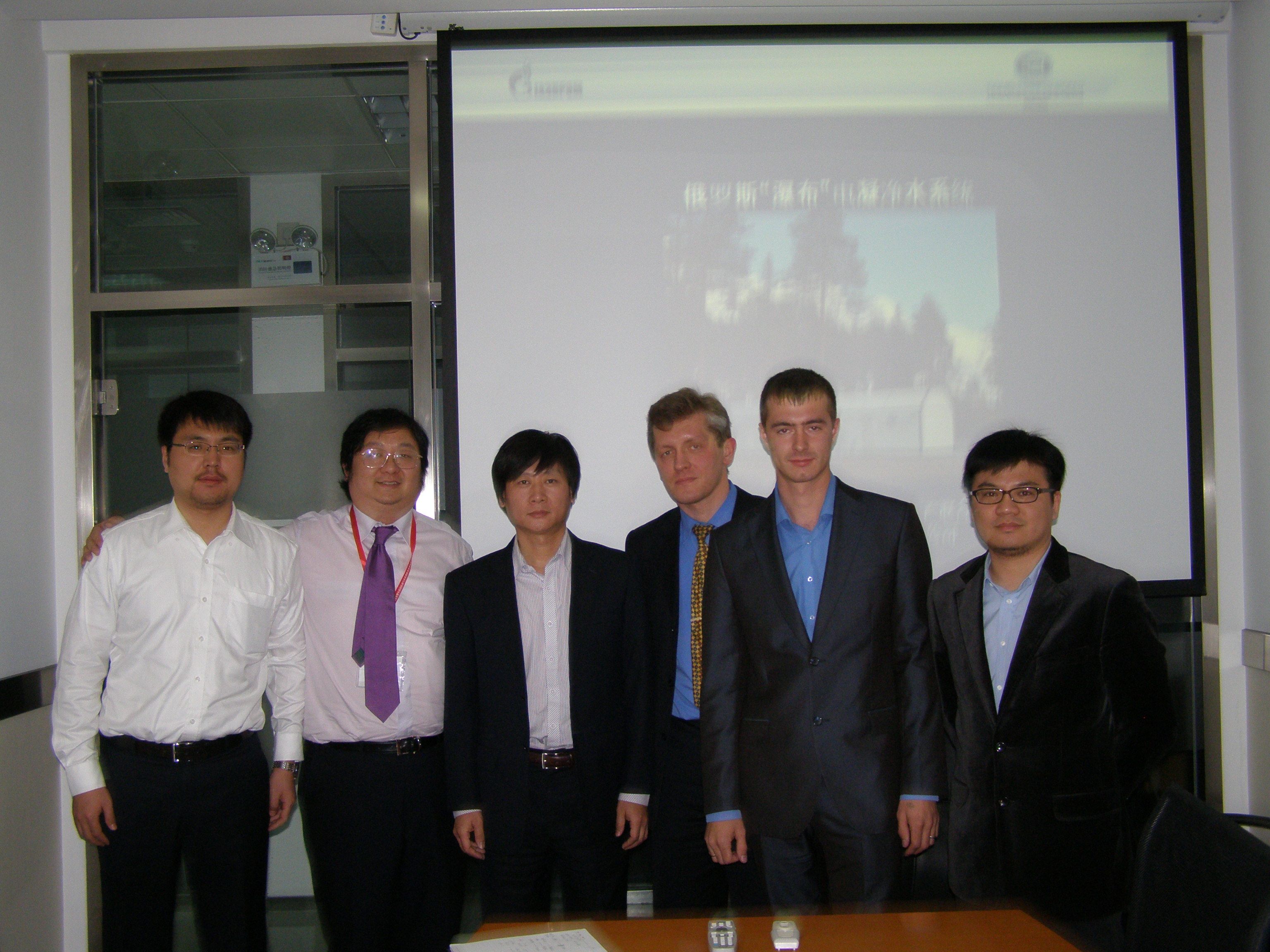 Partoprenantoj de la prezentado de la teknologio Vodopad en Beijing Urban Construction Group Co., Ltd. De maldekstre: 1. Kunlaboranto de Beijing Urban Construction Group Co., Ltd. 2. Long Zhang, kunlaboranto de Kun Peng Power (Bei Jing) Technology Co., Ltd. 3. Jacky Zheng, vic-direktoro kaj ĉefa inĝeniero de Beijing Urban Construction Group Co., Ltd. 4. Stanislav Belov, estro de PR-sekcio estro de TjumenNIIgiprogazo (Rusio). 5. Eŭgenij Miŝkin, estro de akvopuriga subsekcio de TjumenNIIgiprogazo. 6. Gavin Cui, prezidanto de la firmao Kun Peng Power (Bei Jing) Technology Co., Ltd (Ĉinio). Pekino, Ĉinio.